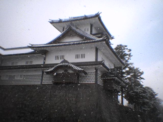 Kanazawa CastleKanazawa Castle